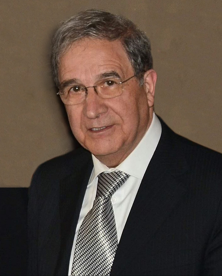 Bologna 2019